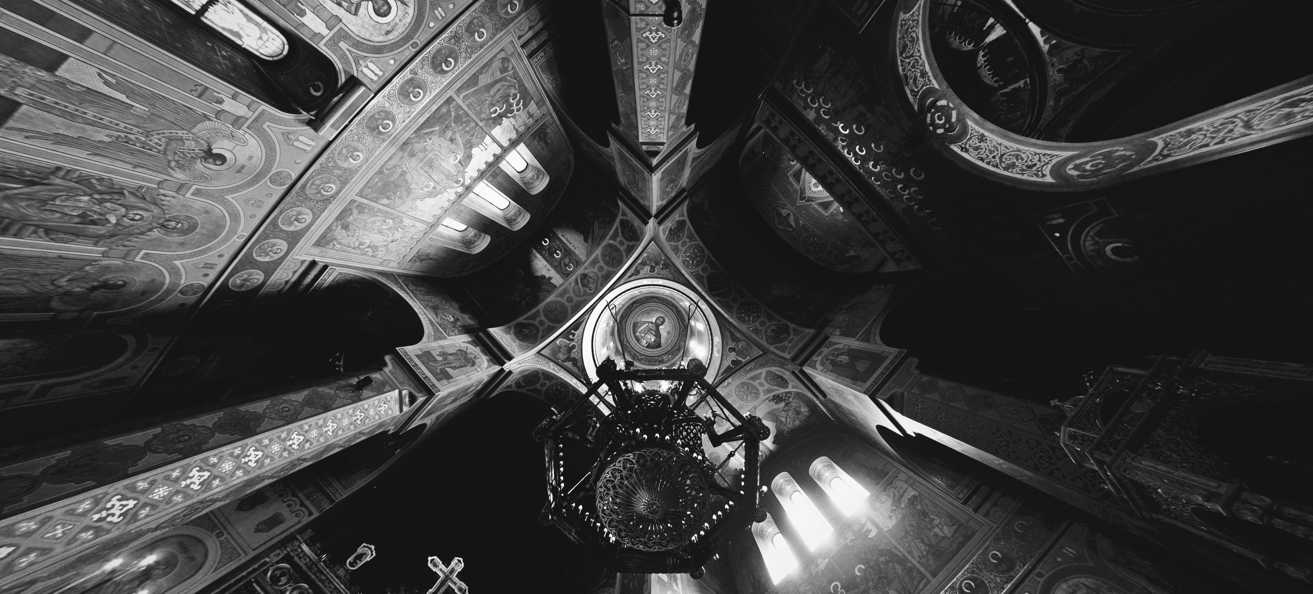 Mitropolia Veche a Țării Românești